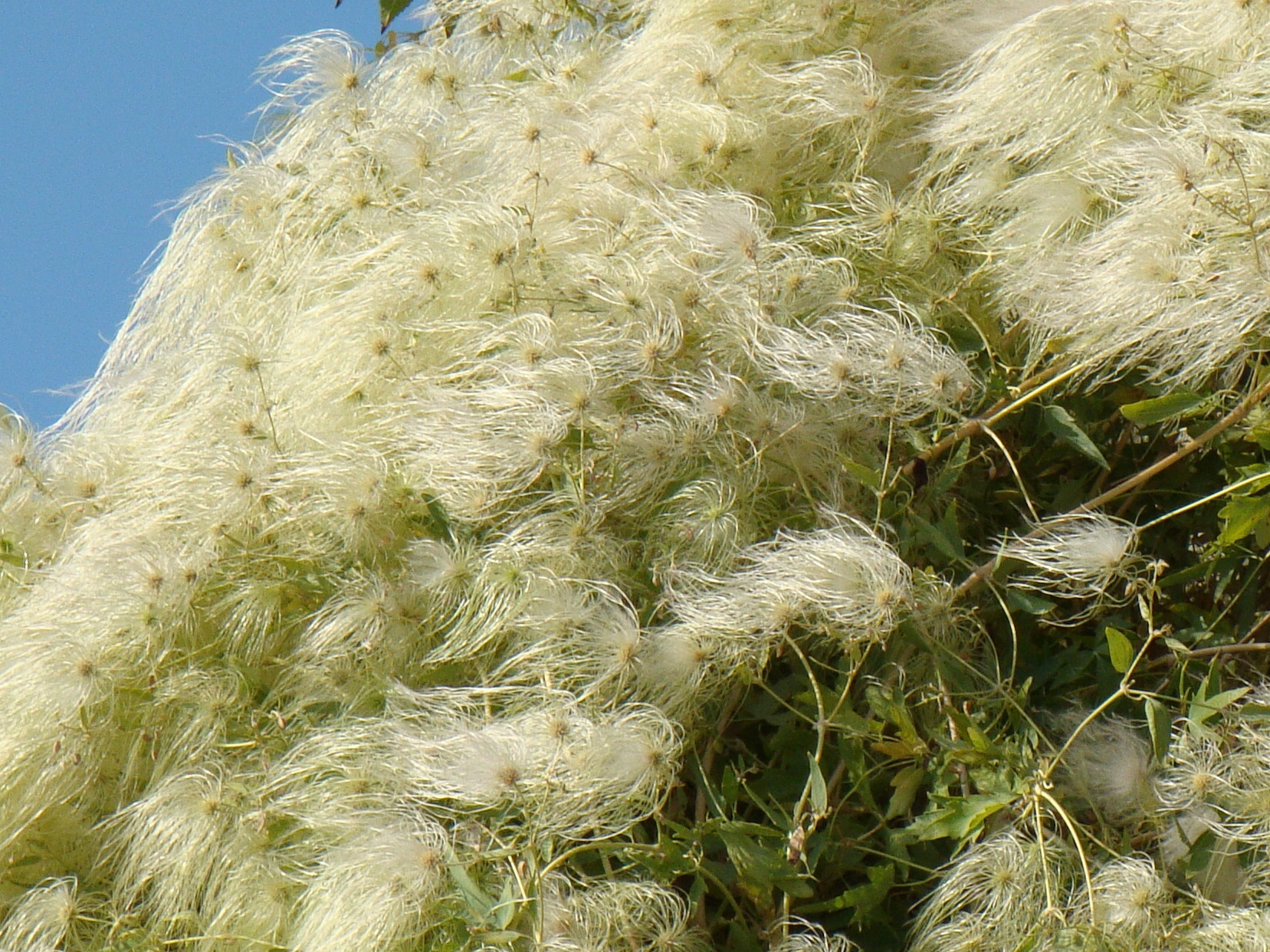 Ломонос восточный (Clematis orientalis). Берег реки Сырдарья, город Байконур, Казахстан.